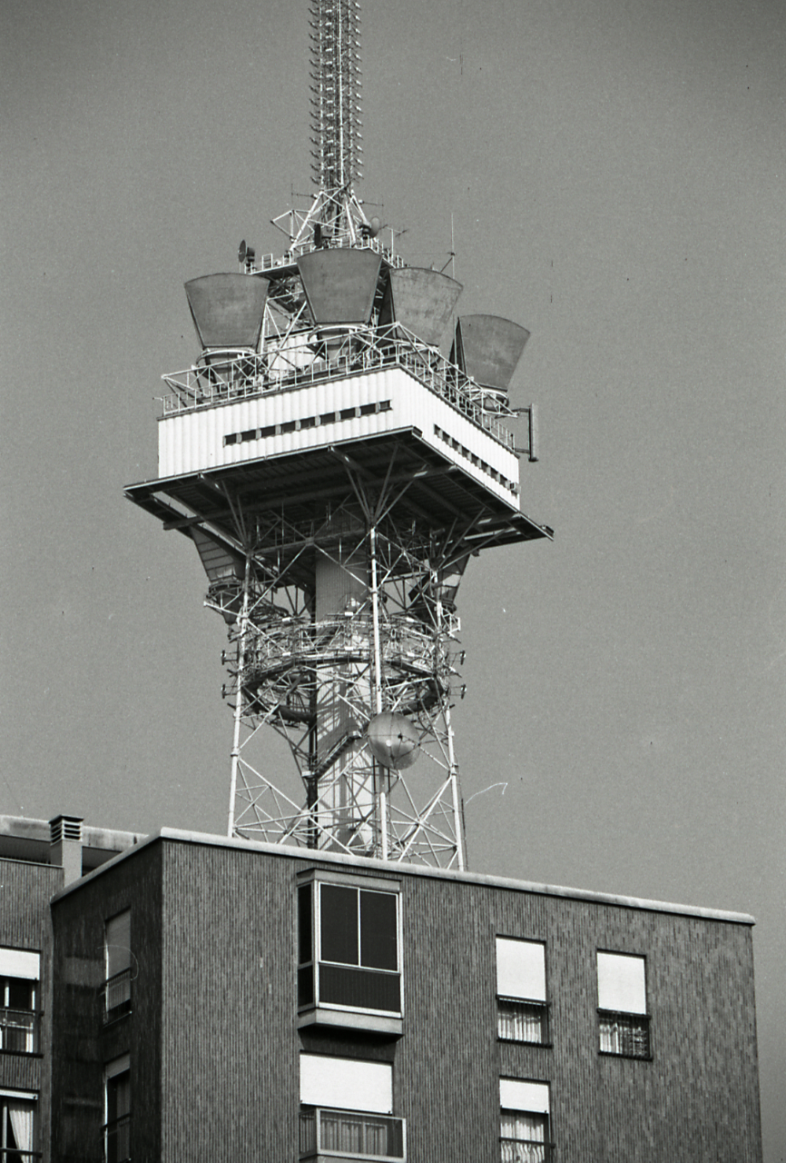 Servizio fotografico : Milano, 1975 / Paolo Monti. - Strisce: 3, Fotogrammi complessivi: 17 : Negativo b/n, gelatina bromuro d'argento/ pellicola ; 35 mm. - ((Sul portanegativi: N[I]K[MA]T FP4. - All'interno del portanegativi: la serie è anche identificata da una linea orizzontale a pennarello blu che separa la suddetta serie dalla precedente di soggetto diverso. - Fonte: Agenda di Paolo Monti: Leica 1501-3000 Controllo numerazione (1950-1978), presso Archivio Paolo Monti